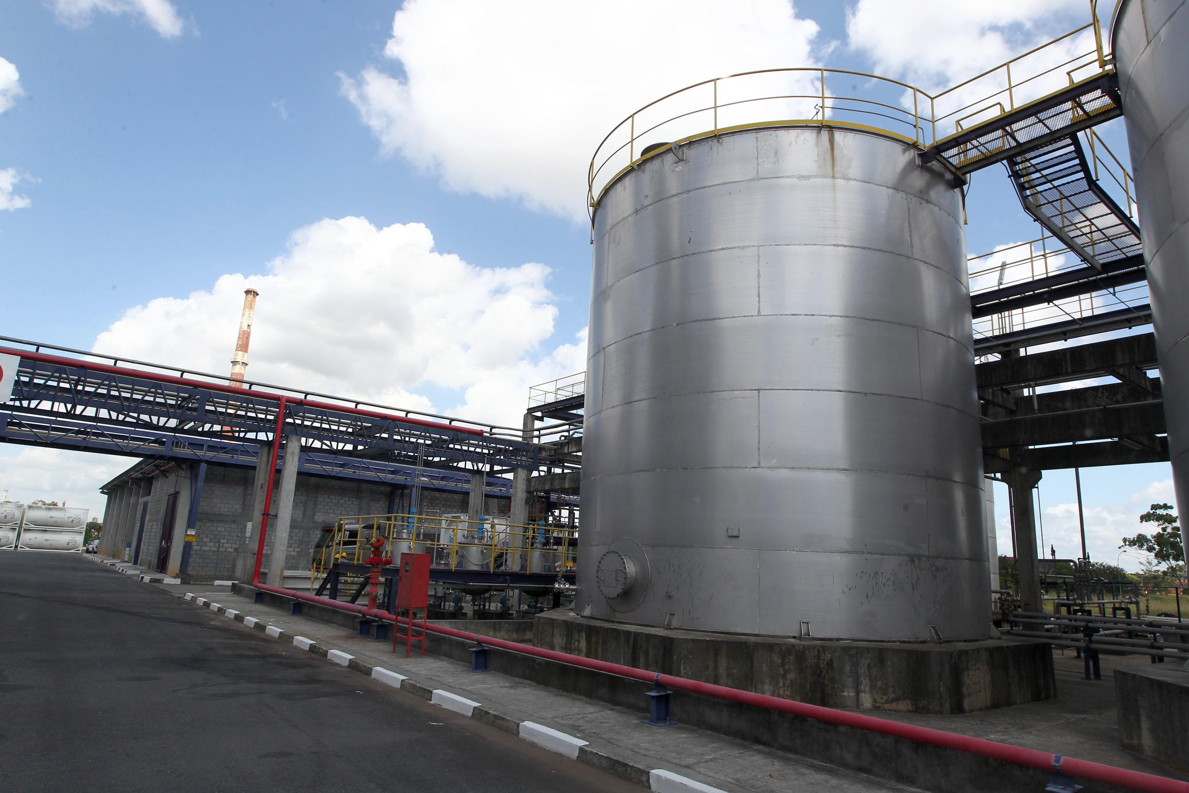 Governador Jaques Wagner participa da inauguração da Unidade de Hidrogênio da Peroxy Bahia, no Polo Petroquímico de Camaçari. Foto Manu Dias/ SECOM